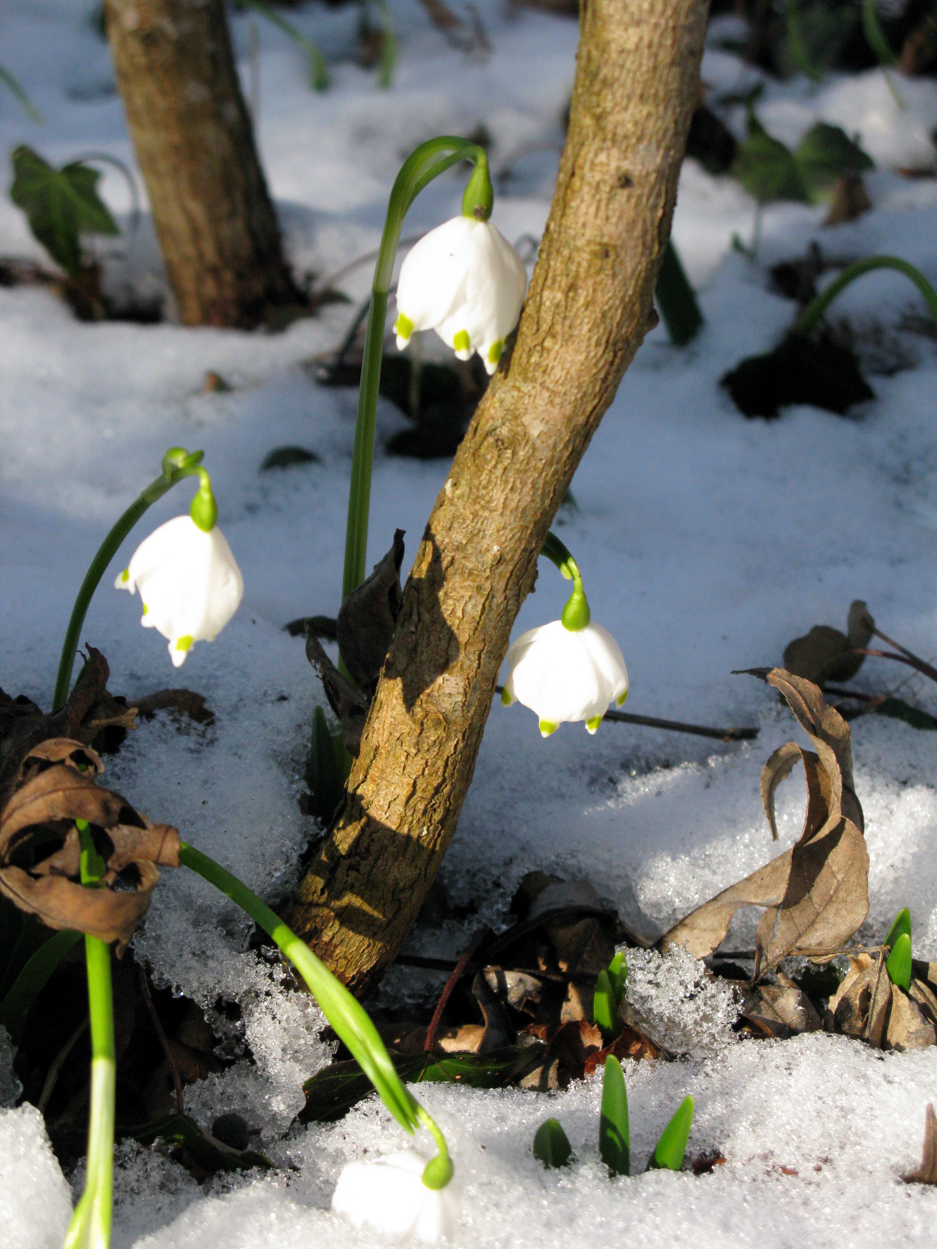 blühende Märzenbecher am Honigbuck im Freiburger Mooswald